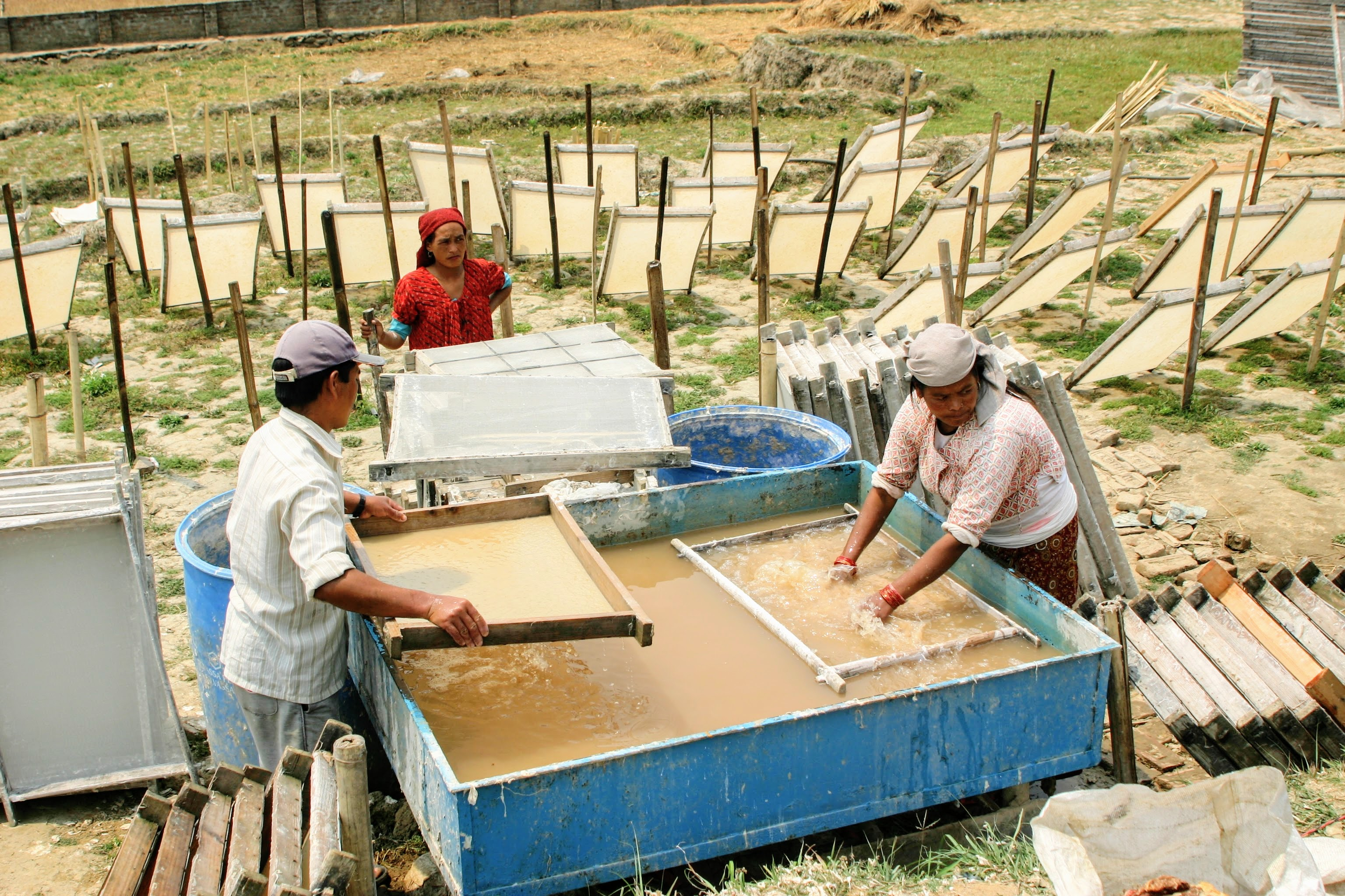 Fabrication artisanale du papier lokta (à partir de Daphne papyracea), Kathmandou, Nepal